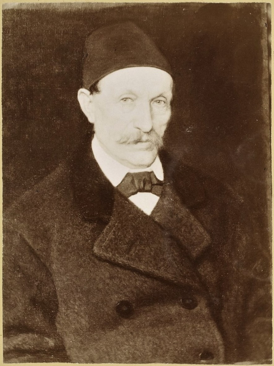 Franz Pruner-Bey par Ugo Bettini, photographe à Livourne. Collection de portraits de la Société de géographie de Paris